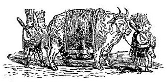 Gravure extraite du livre de Théophile Lavallée Le diable à Paris : Paris et les parisiens : mœurs et coutumes, caractères et portraits des habitants de Paris, tableau complet de leur vie... (texte de MM. de Balzac, Eugène Sue, George Sand, et al.) ; séries de gravures avec légendes par Gavarni... vignettes par Bertall..., J. Hetzel éditeur, Paris 1845-1846. Légende du dessin : Le bœuf gras. Élève sorti de l'institution Cornet. (Cornet : nom d'un éleveur fameux, fournisseur en bœufs gras parisiens).